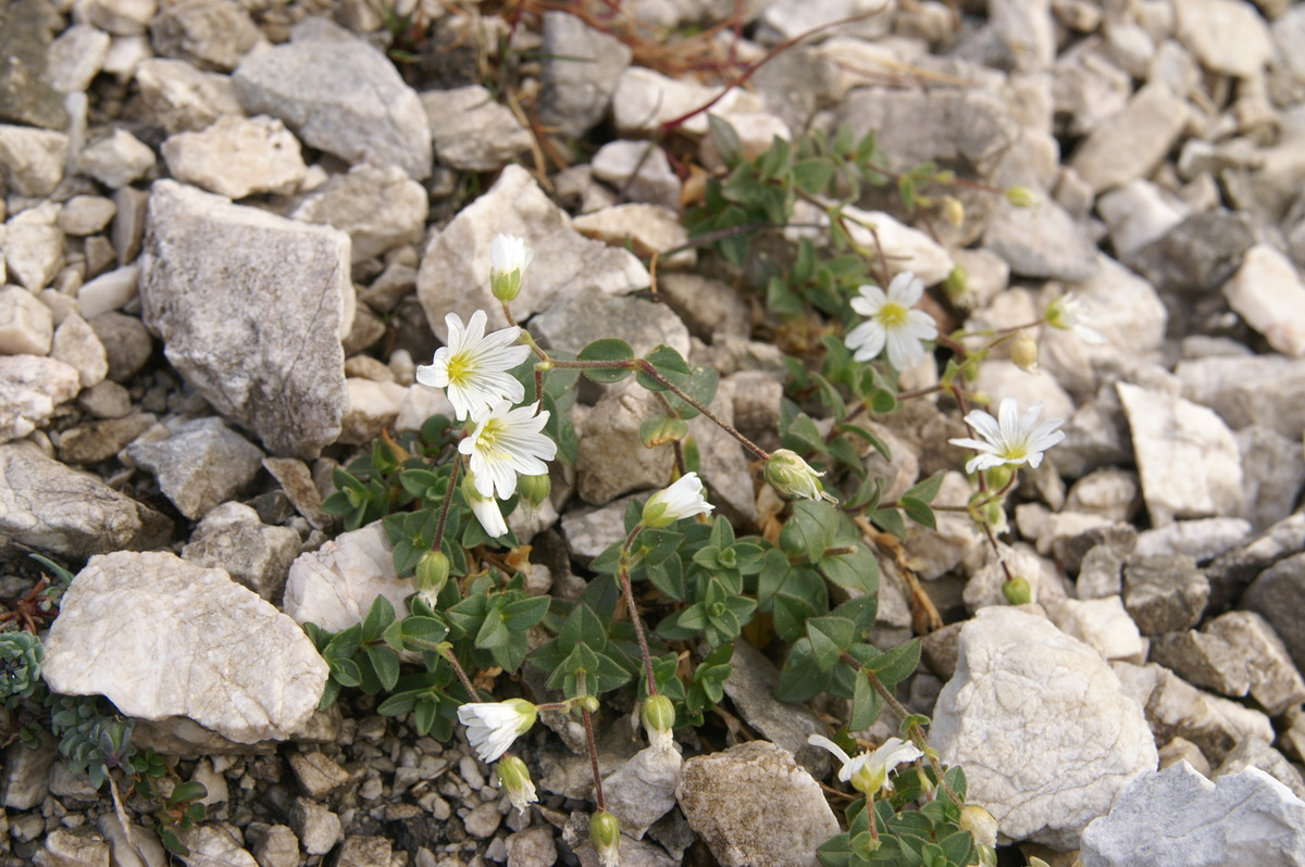 Koroška smiljka na Konjskem prevalu - Planika.